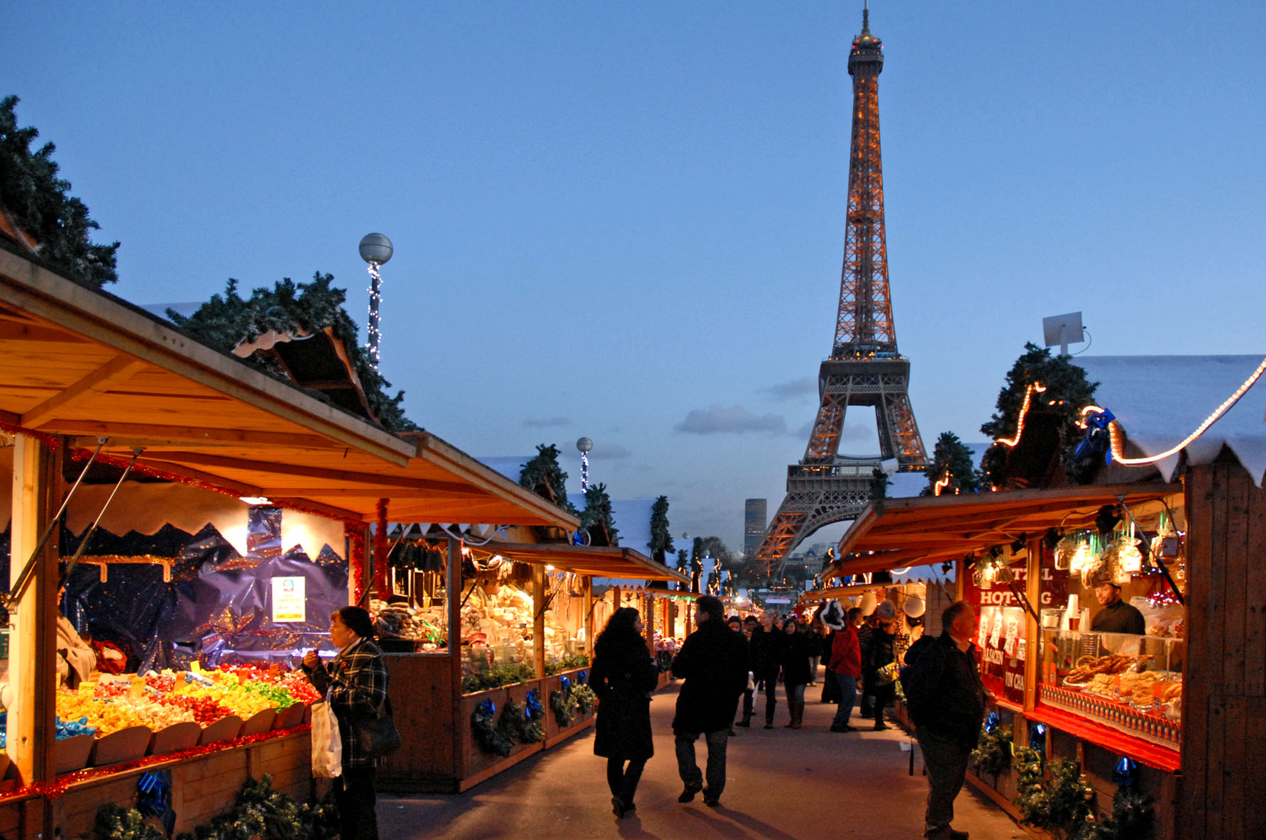 Le marché de Noël des Jardins du Trocadéro Du 10 au 20 décembre 2009, ouvert tous les jours de 11h à 21h. Noël sous le signe de l’Europe, avec plus de 20 pays représentés : Place de Varsovie, une centaine de chalets et une patinoire sont installés avec au programme, produits du terroir, artisanat et animations.